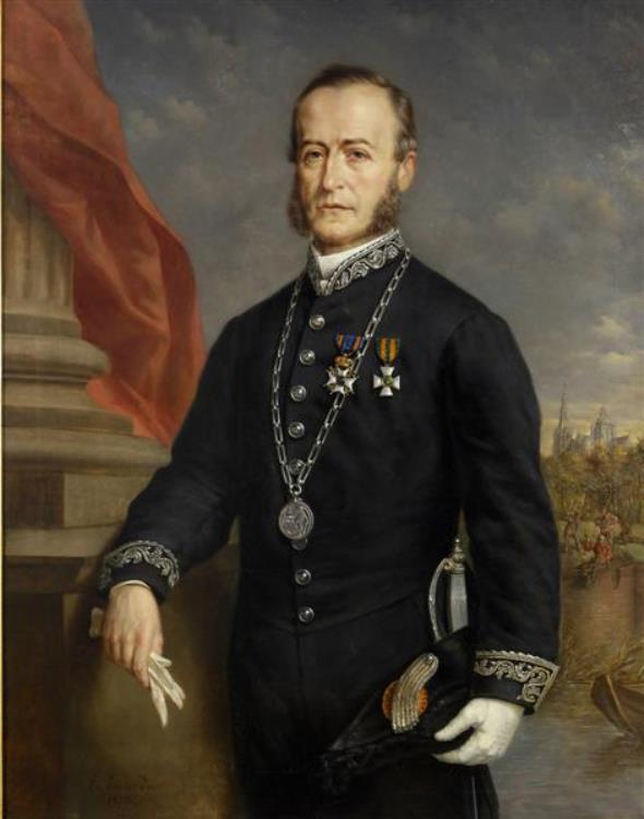 Burgemeester 's-Hertogenbosch